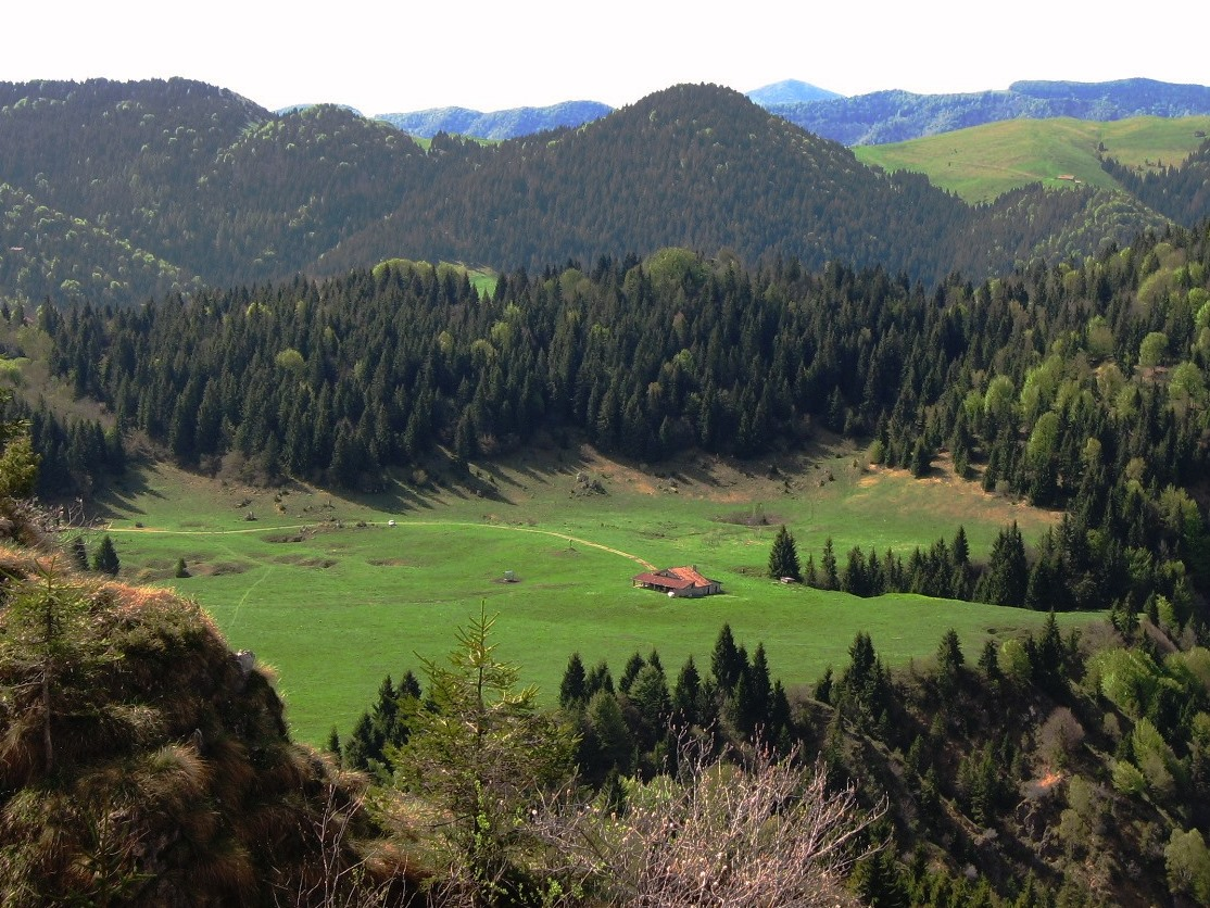 Campo d'Avene, Gandino (BG)